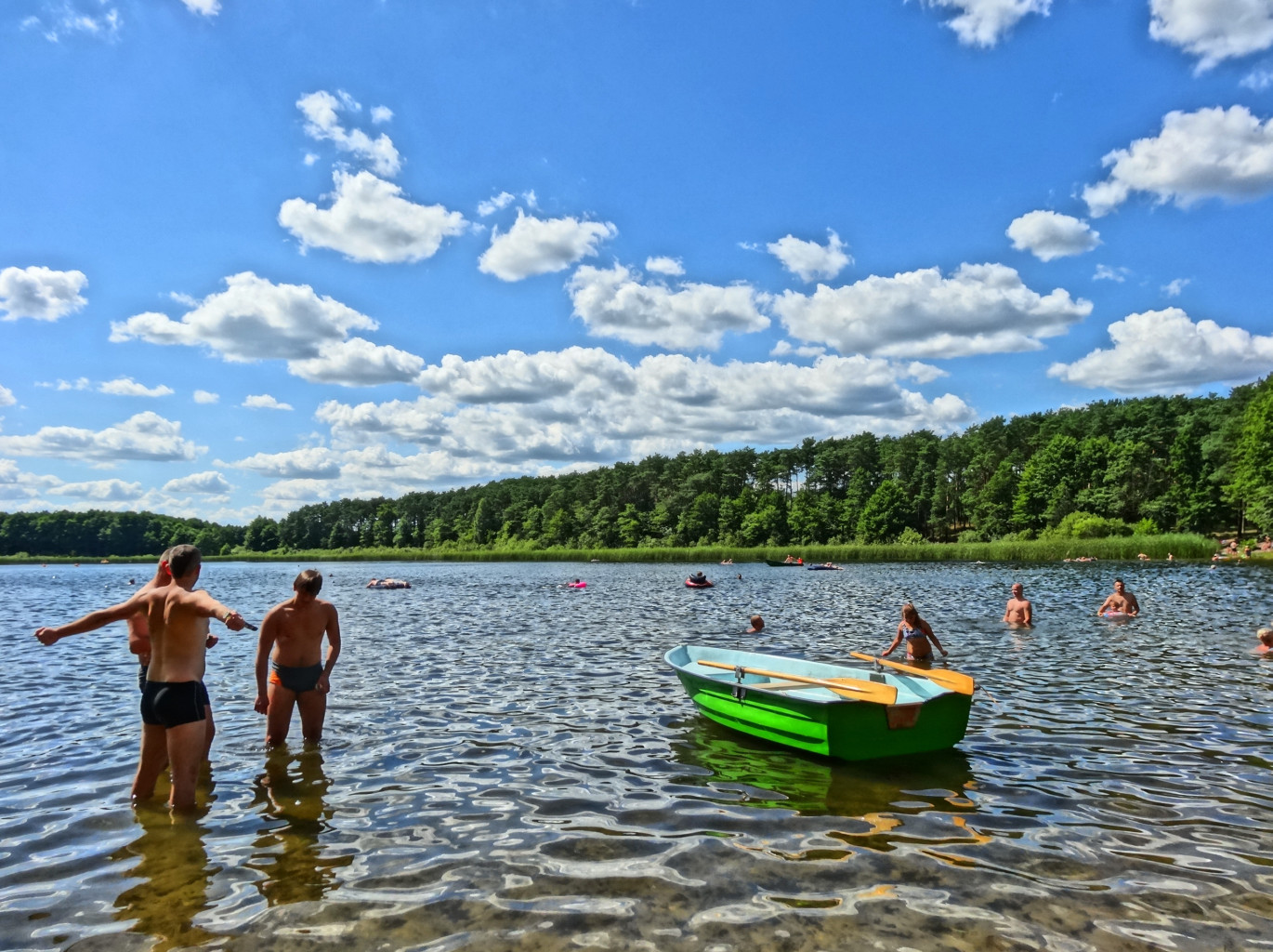 Jezioro Jezuickie w Pieckach w Puszczy Bydgoskiej, gm. Nowa Wieś Wielka